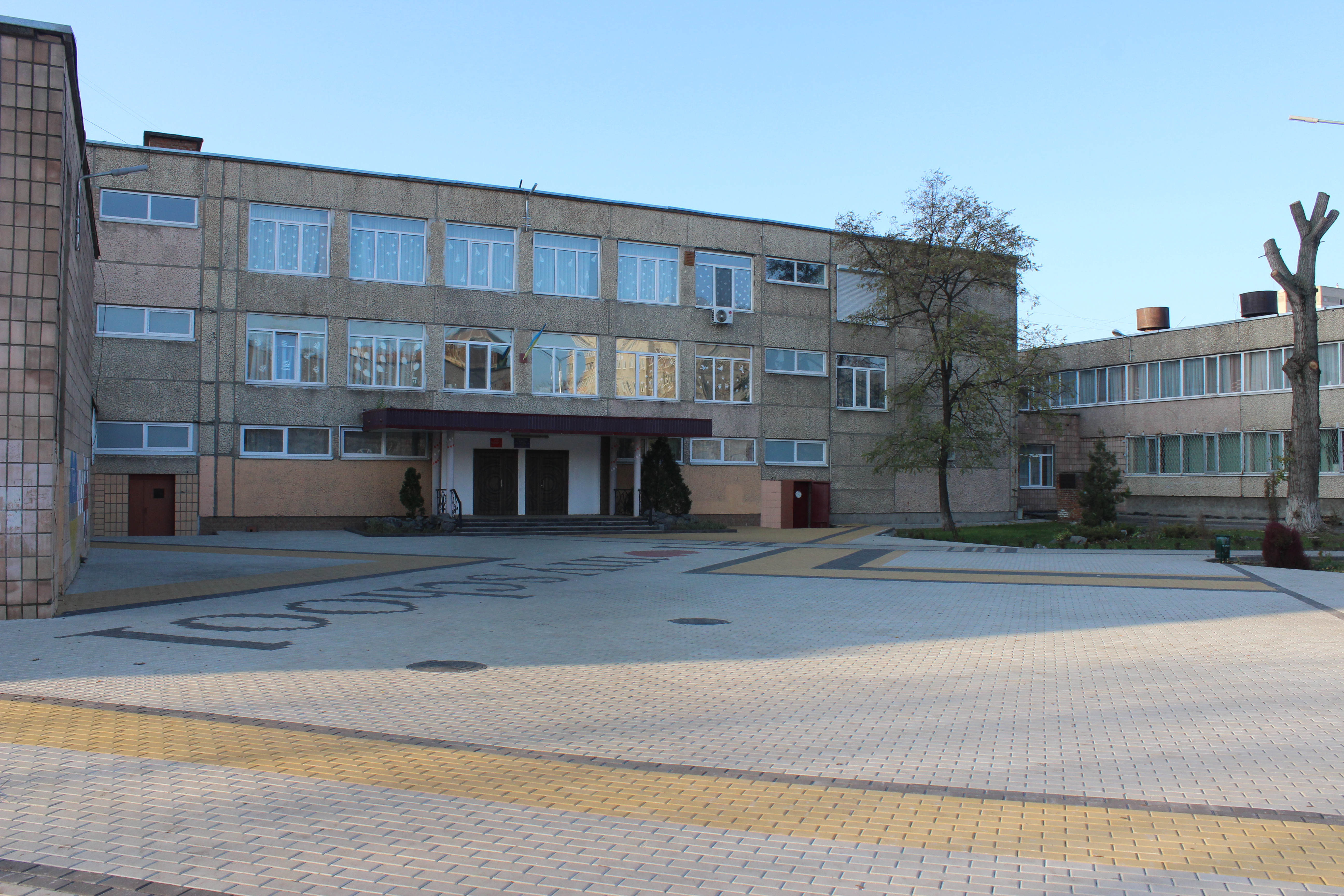 На фото зображена СЗОШ І-ІІІ ступенів № 4 з поглибленим вивченням англійської мови